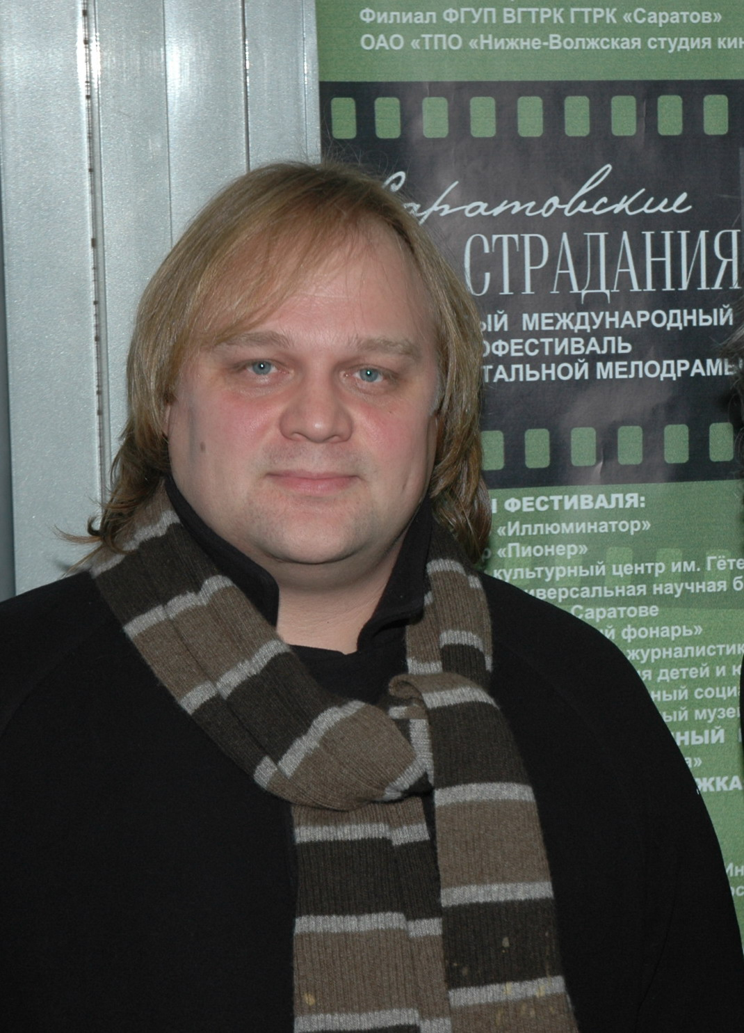 Режиссер Алексей Федорченко - председатель жюри четвертого фестиваля "Саратовские страдания"